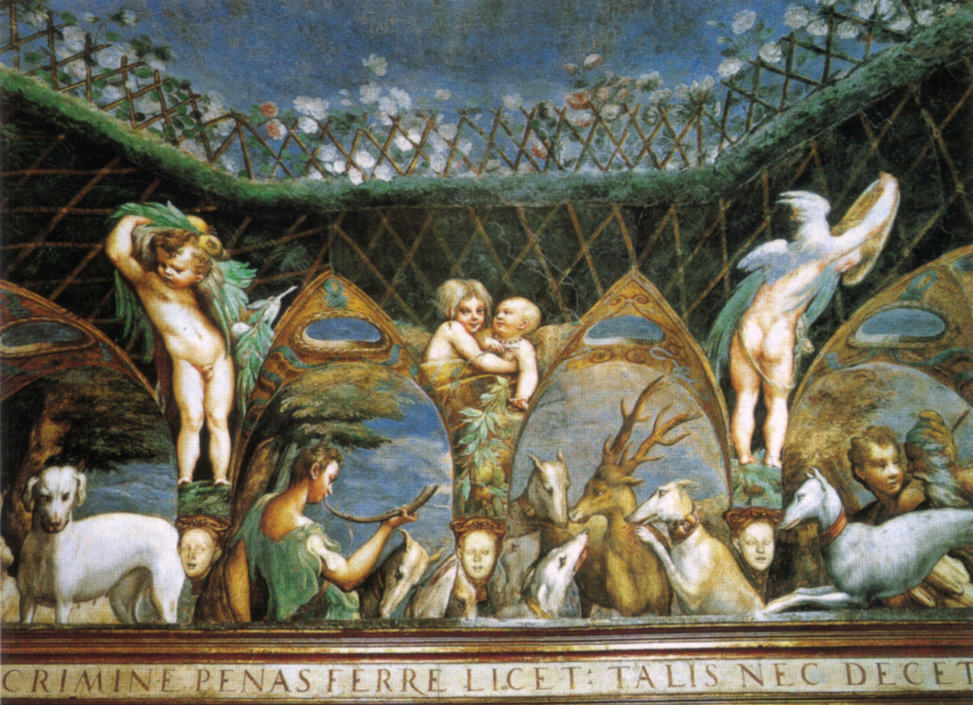 detail